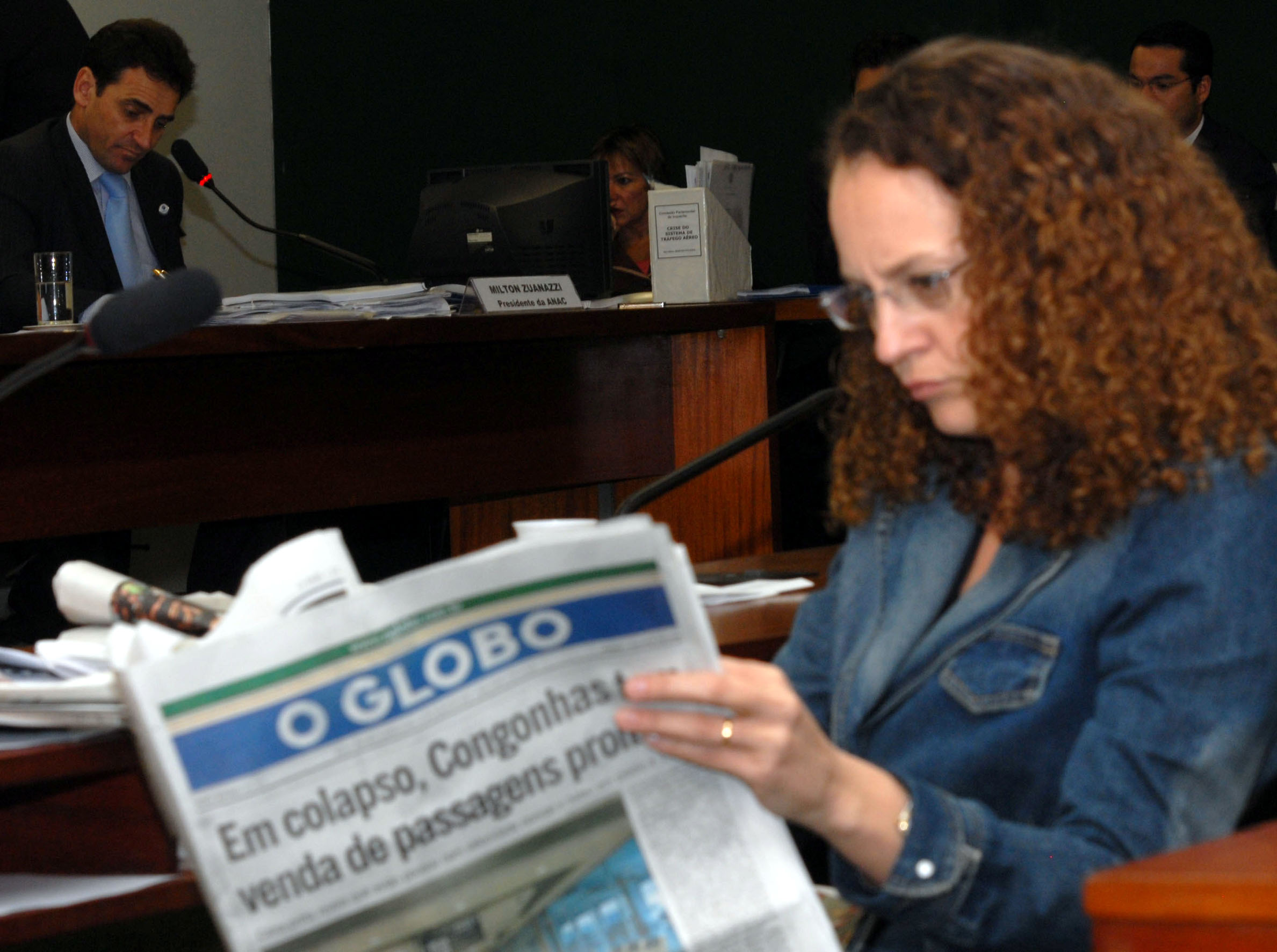 Deputada Luciana Genro lendo o jornal O Globo.